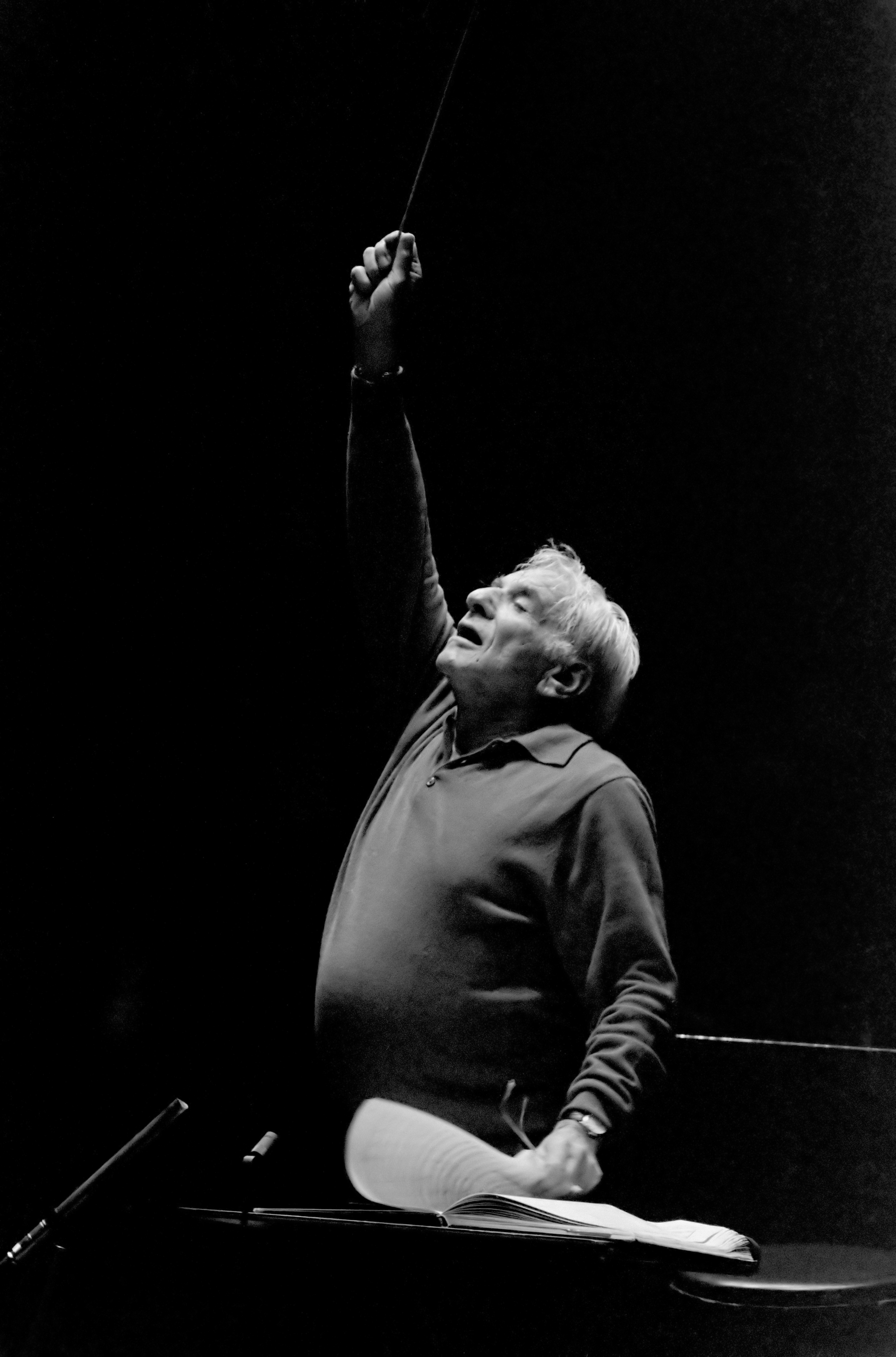 Leonard Bernstein repeteert met Concertgebouworkest 7 oktober 1987